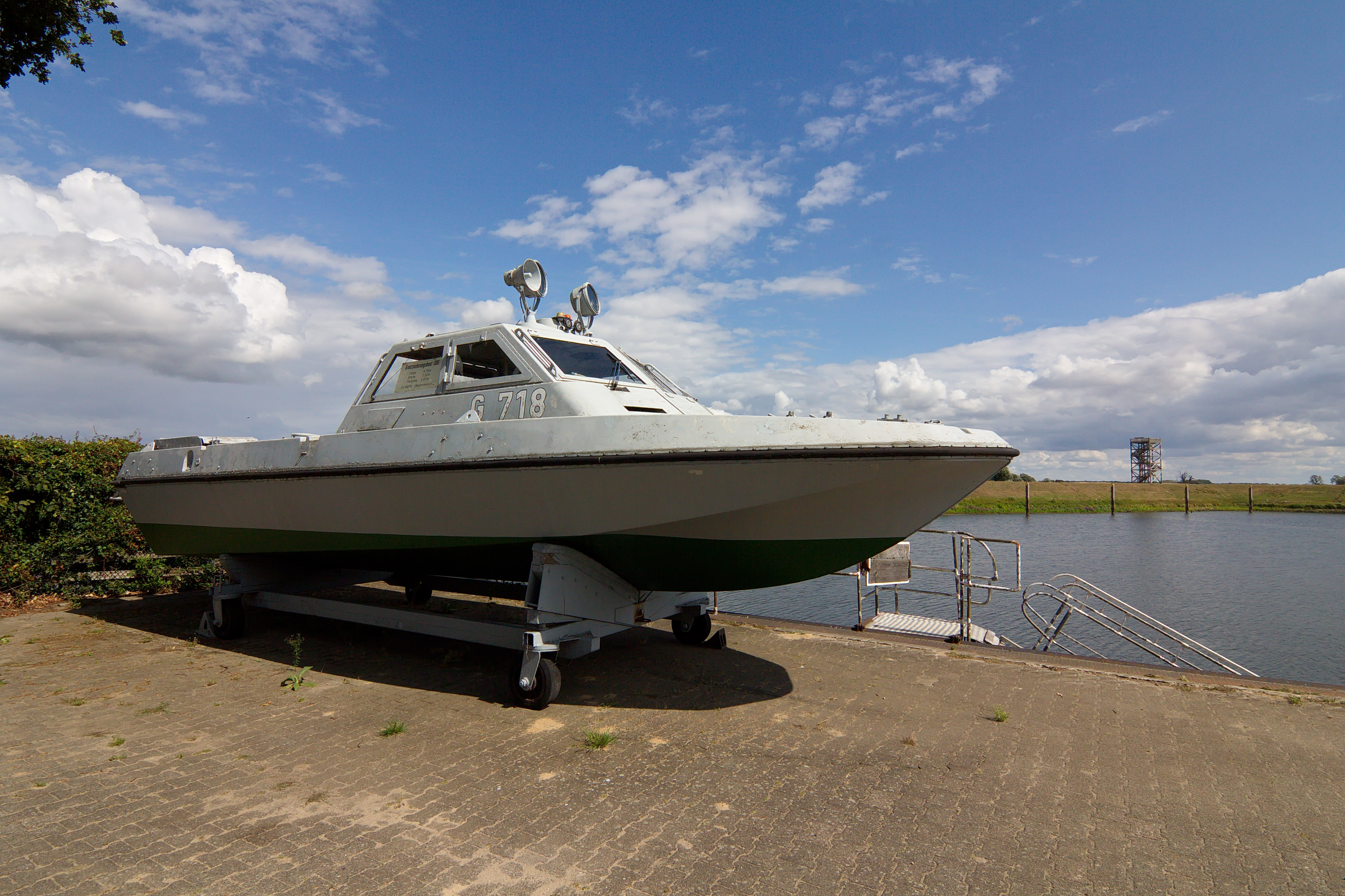 Grenzlandmuseum Fischerhaus in Schnackenburg an der Elbe in Niedersachsen, Deutschland